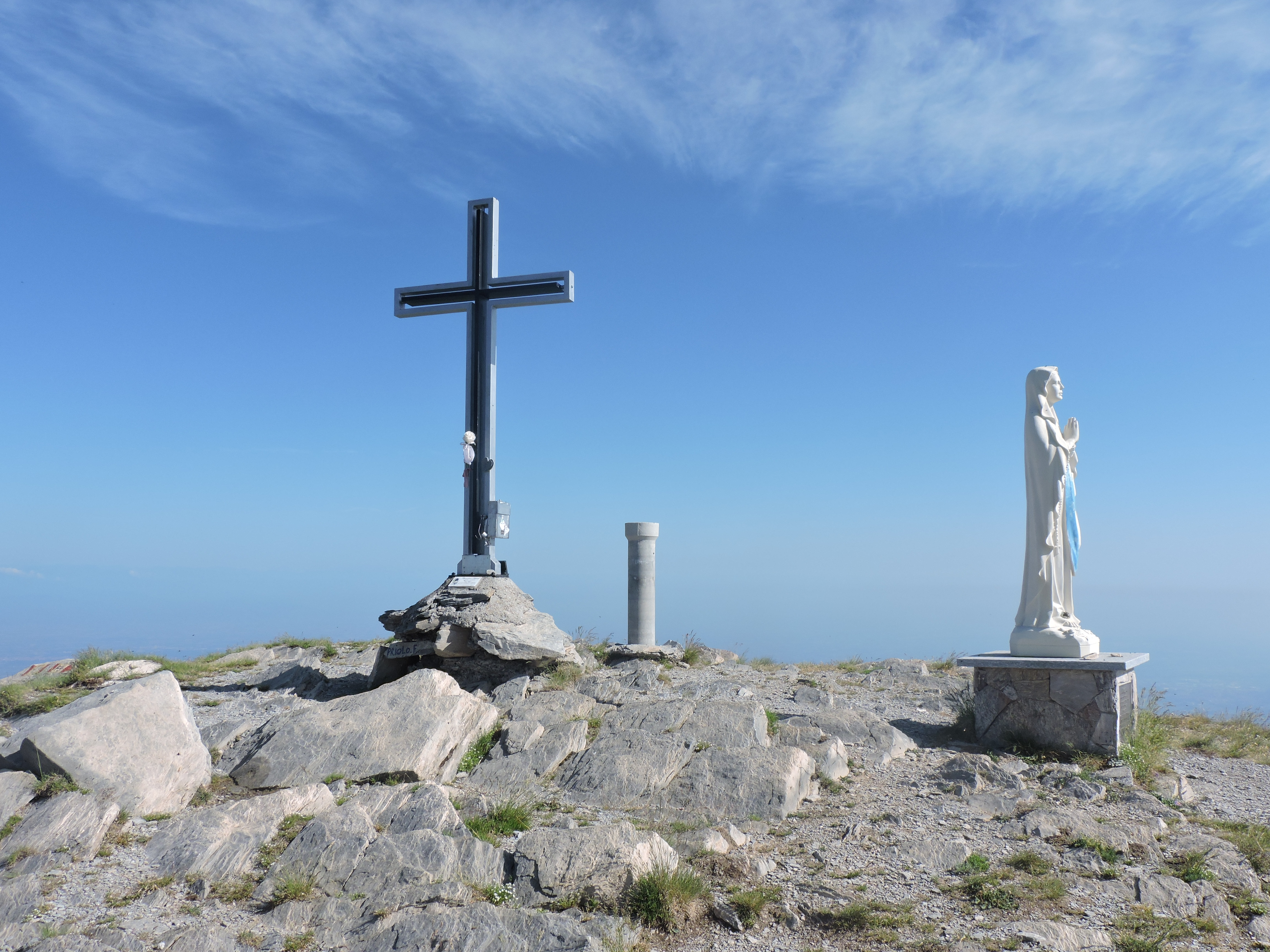 La cima del Mondolè: madonnina, croce e libro di vetta, colonnina trigonometrica